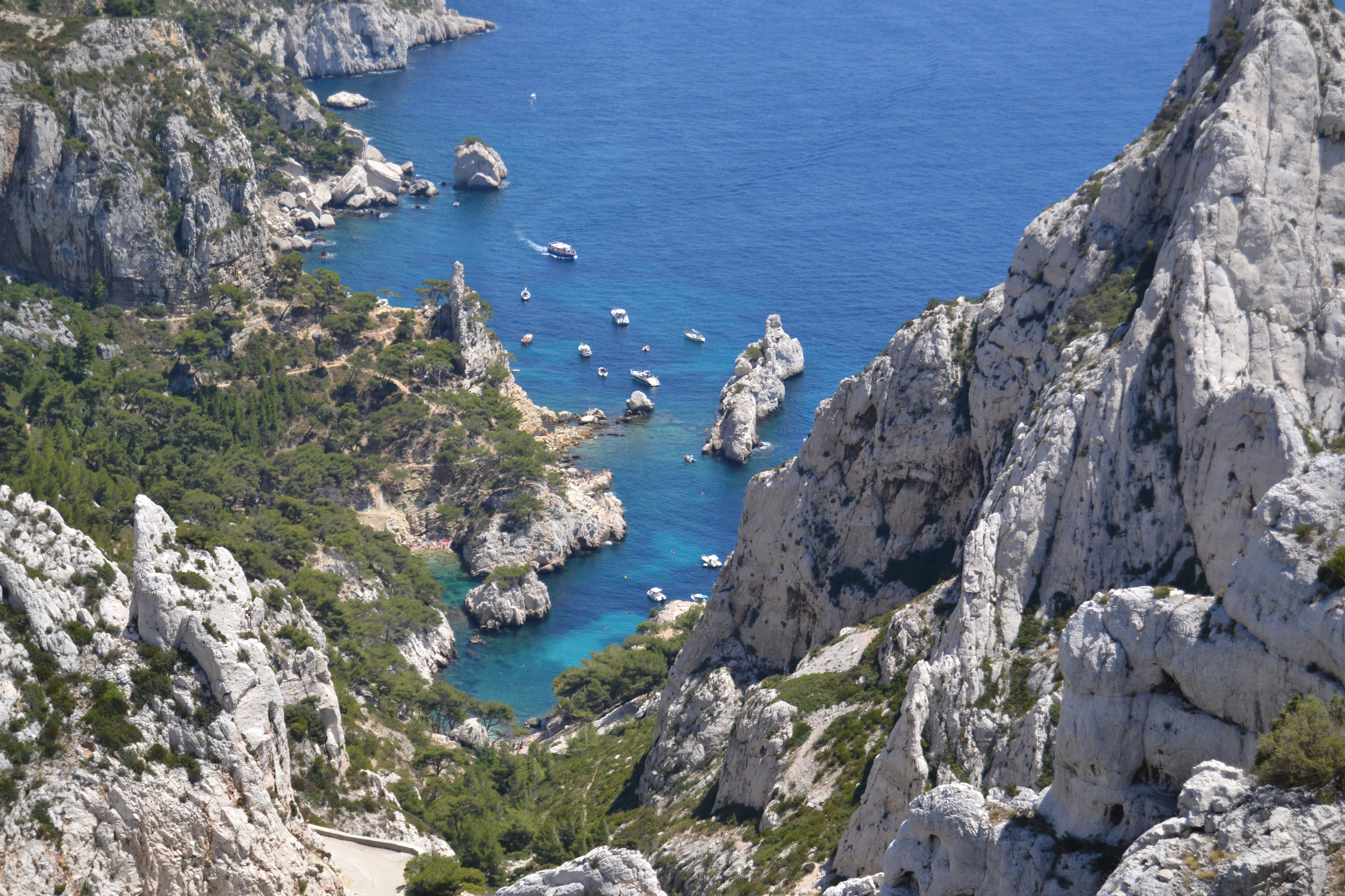 Calanca de Sugiton en 2011.